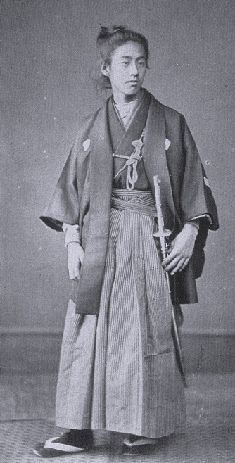 奥平昌邁 Okudaira Masayuki.鶏卵紙